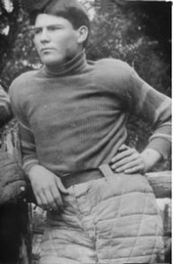 Sewanee back Diddy Seibels